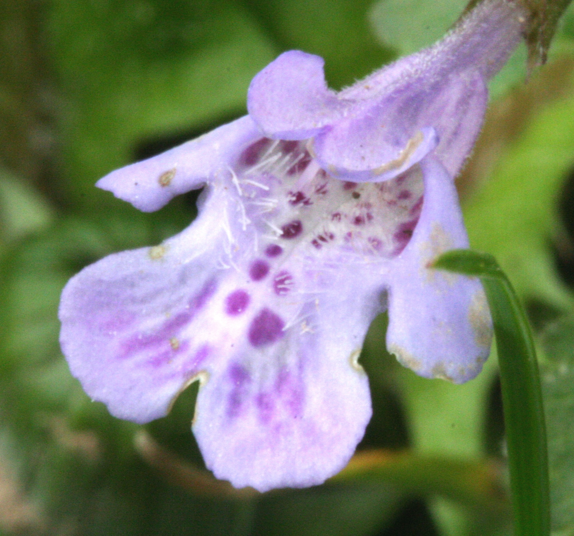 Glechoma_hederacea (Ellera terrestre comune Località: Villa Prima, Limana (BL), 350 m s.l.m.